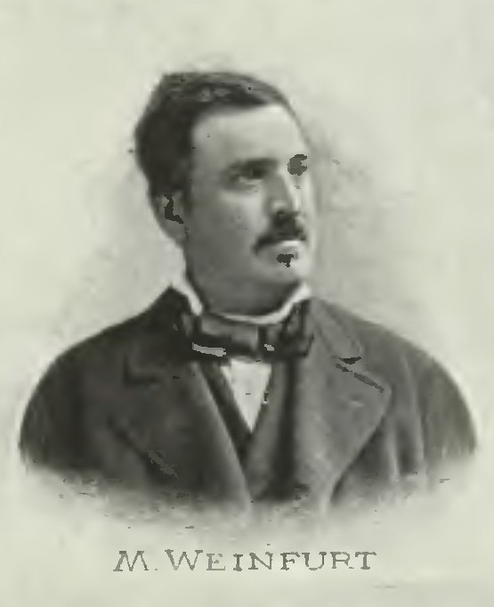 Portrét – Martin Weinfurt (1832-1890), Český učitel a spisovatel.